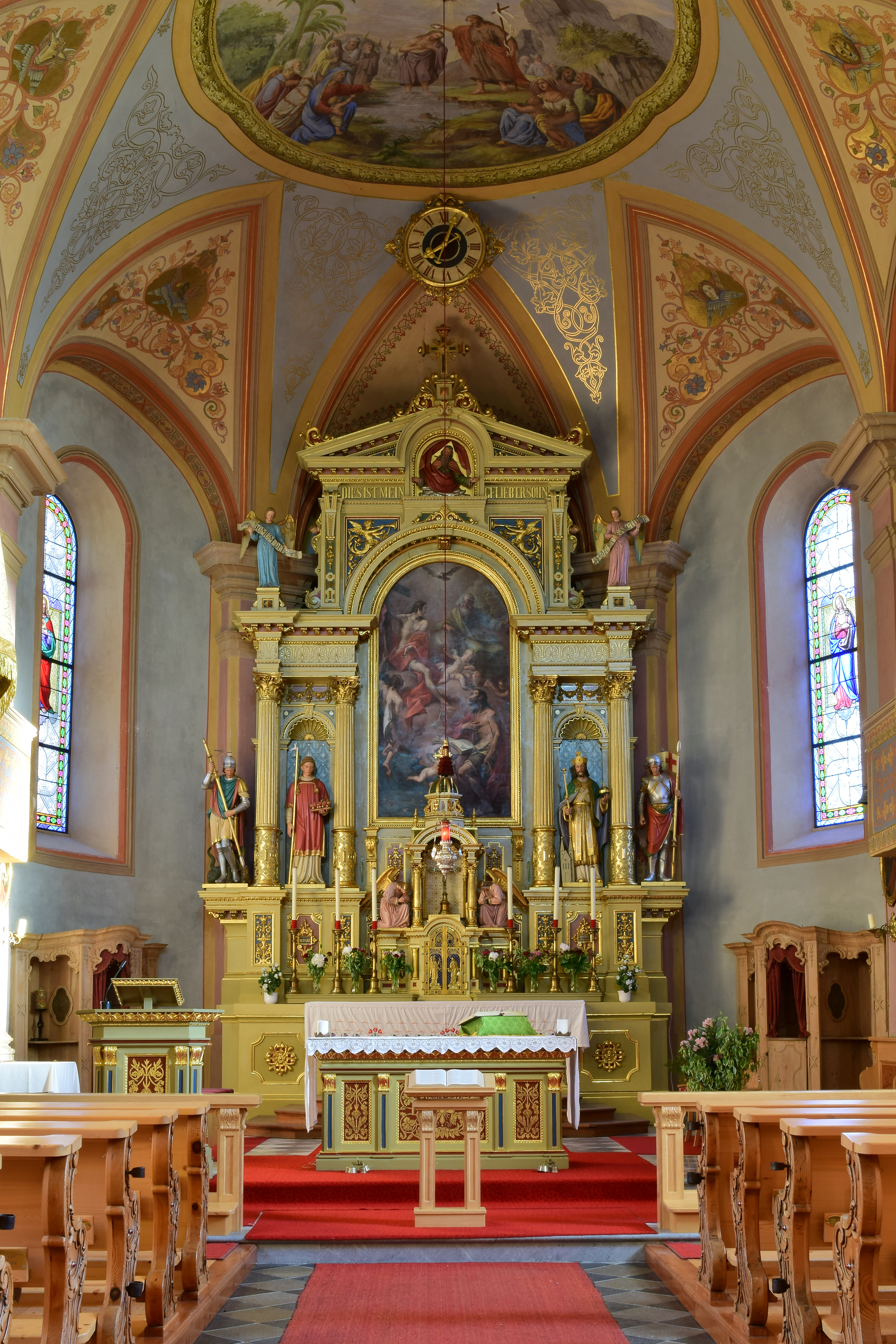 Kath. Pfarrkirche hl. Johannes der Täufer und Friedhof